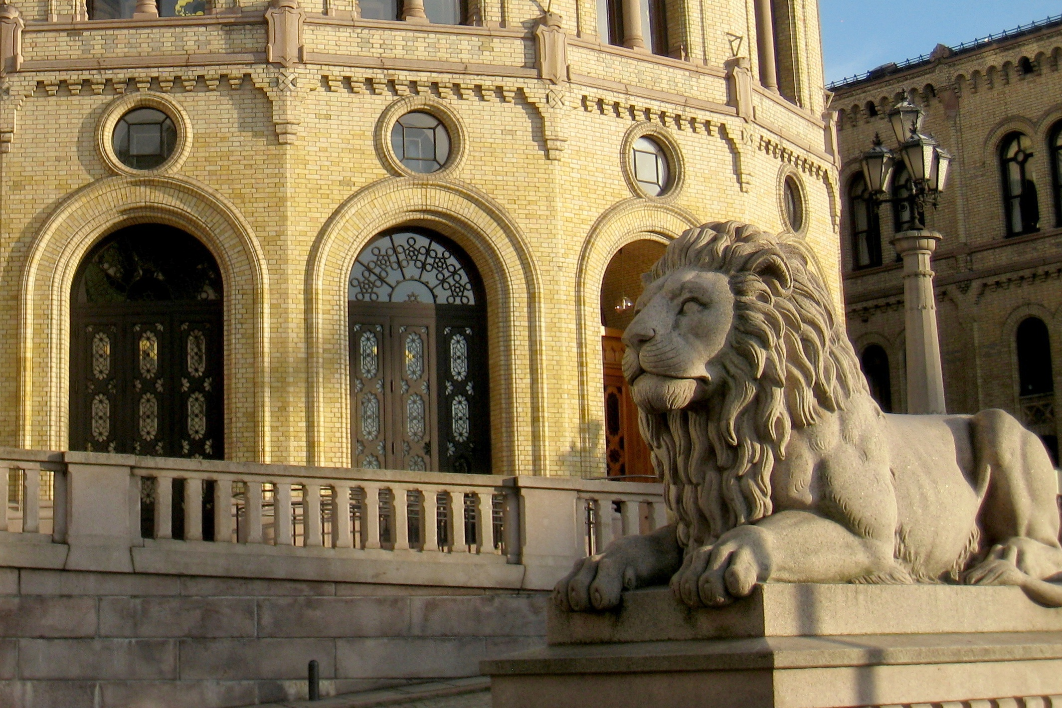 Stortingsbygningen detail, Oslo, Norway.